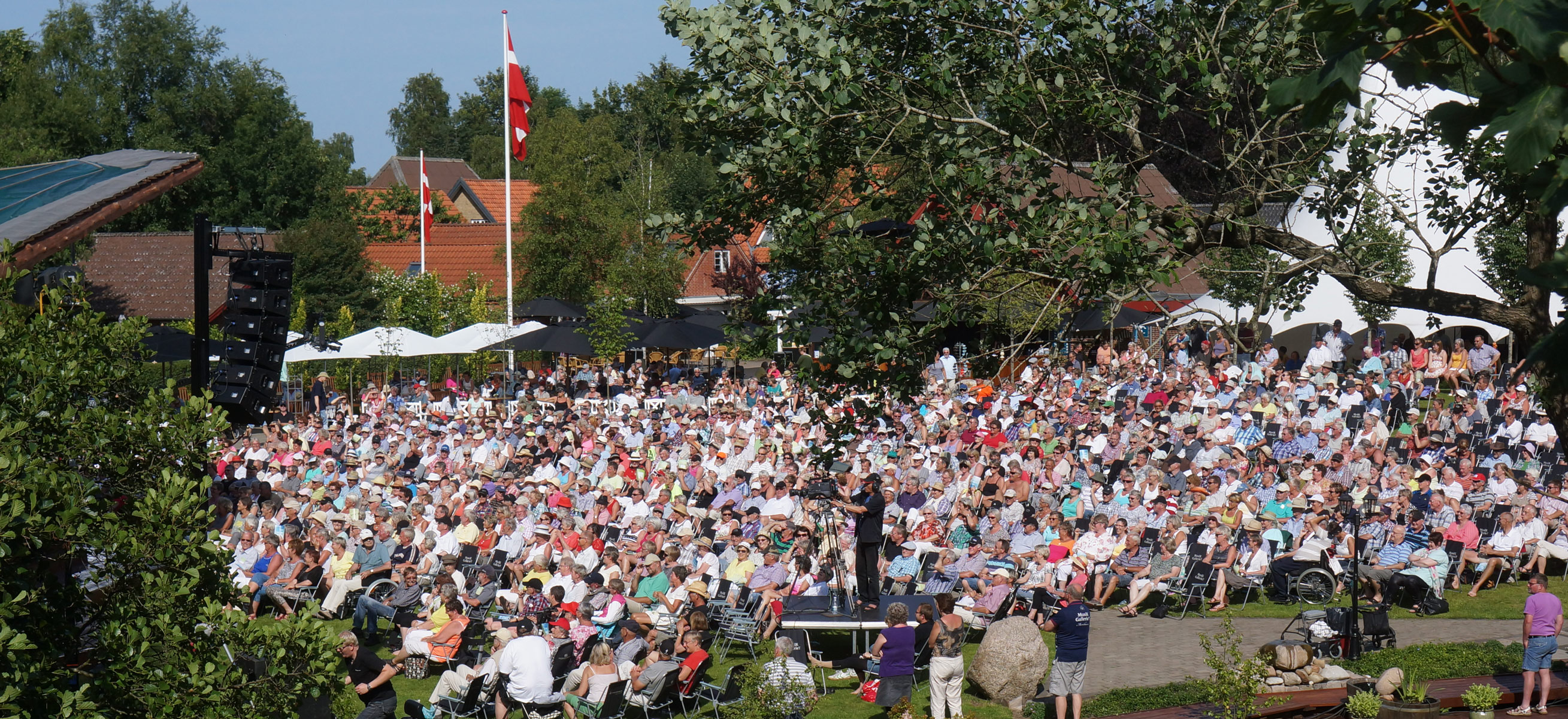 Sommersang i Mariehaven søndag den 7. juli 2013